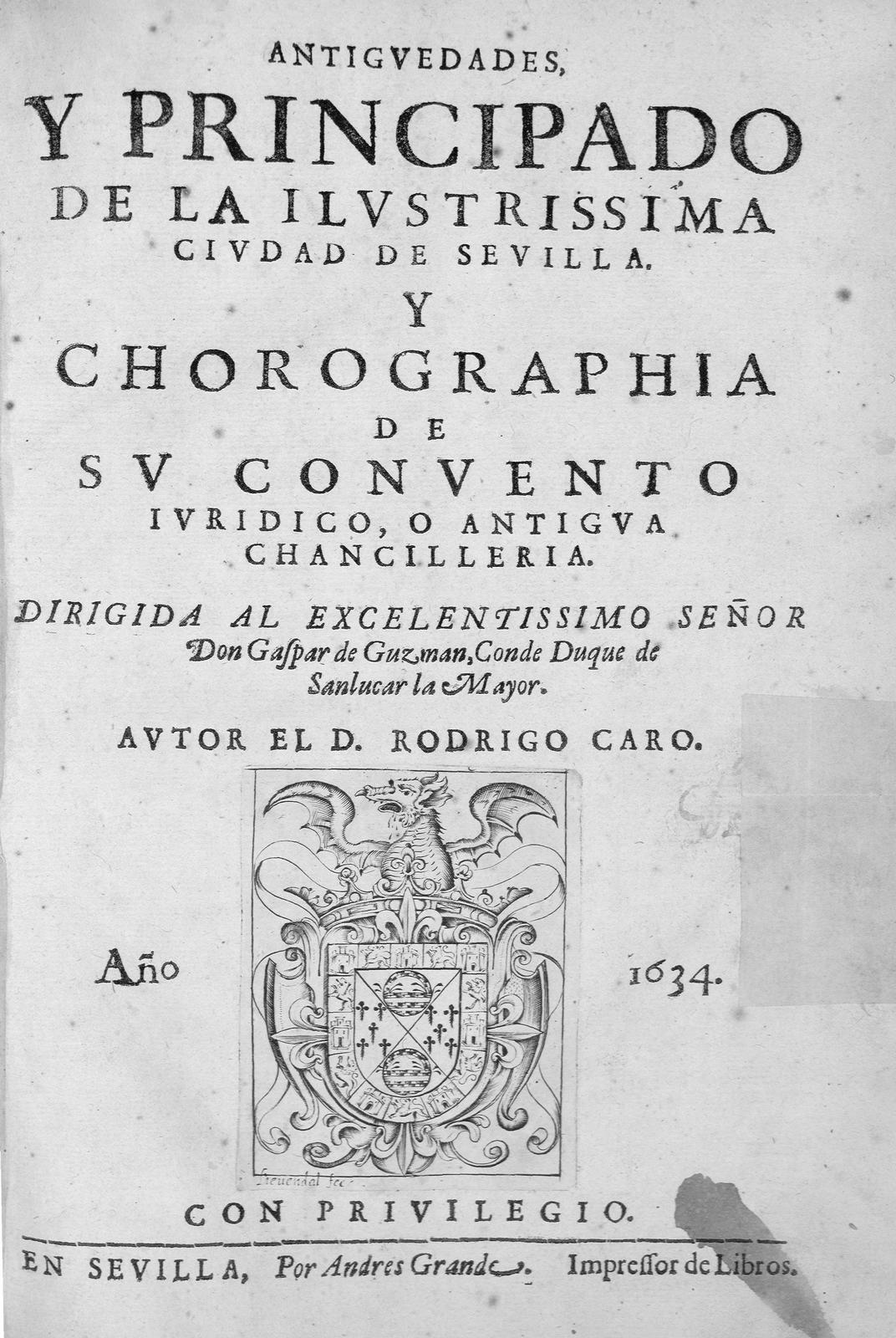 Rodrigo Caro, Antiguedades y principado de la ilustrissima ciudad de Sevilla, Sevilla, por Andrés Grande, 1634